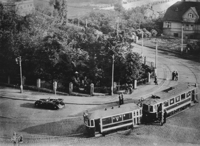 Место покушения на Гейдриха 27 мая 1942 года